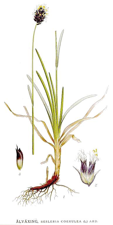 Sesleria caerulea (L.) Ard., syn. Sesleria uliginosa Opiz. Original Description "Älväxing", Sesleria coerulea (L.) Ard.